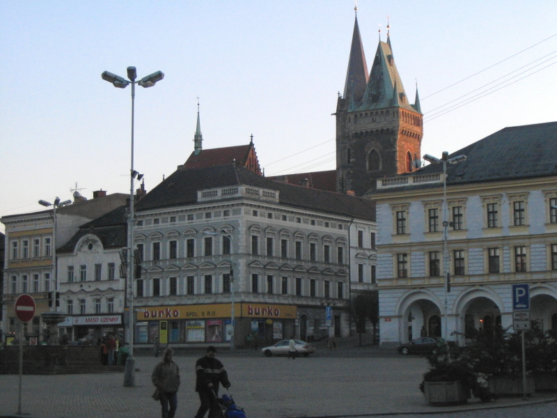 Jižní strana hlavního náměstí v Kolíně